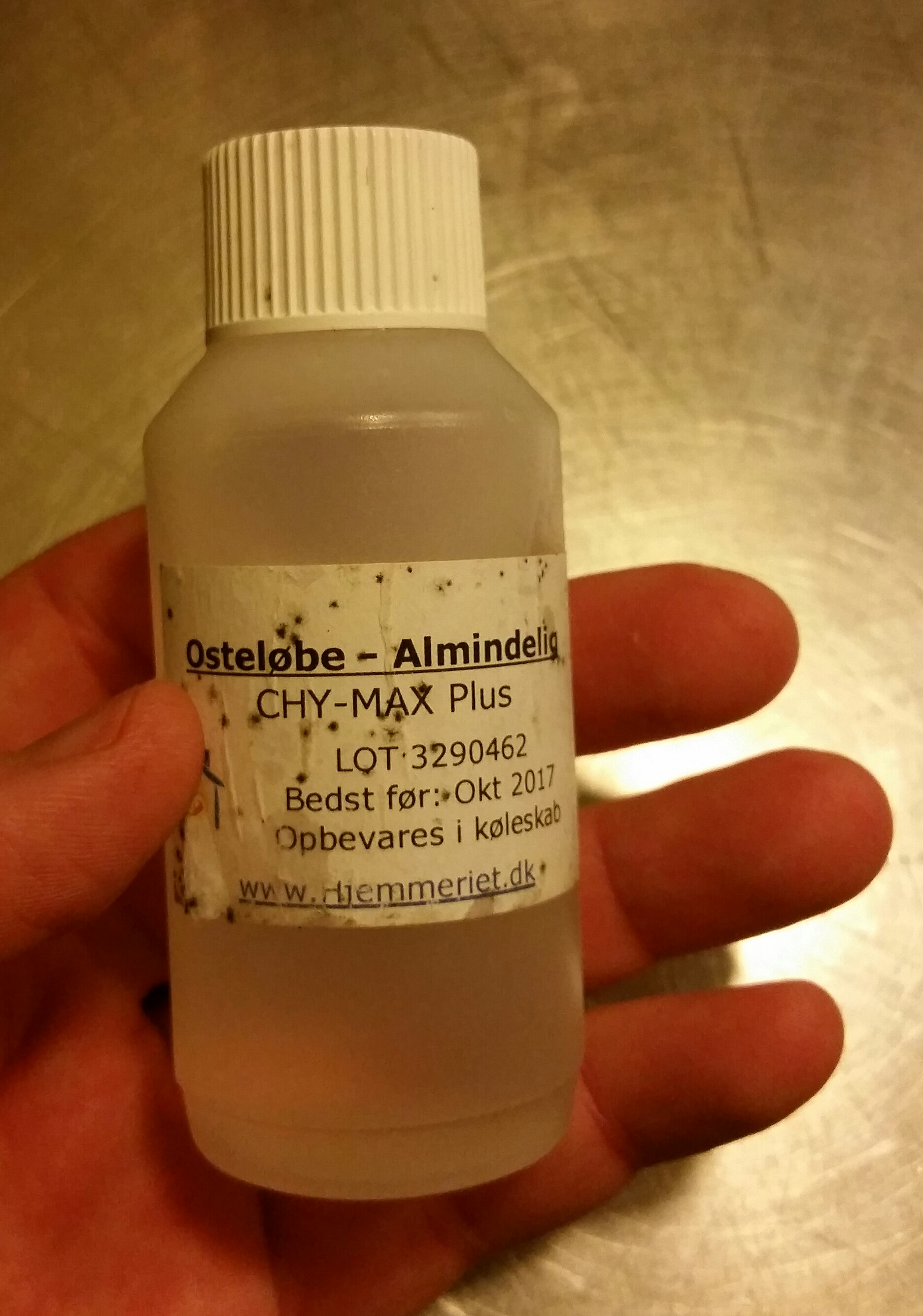 בקבוקון ובו אנזים הגבנה